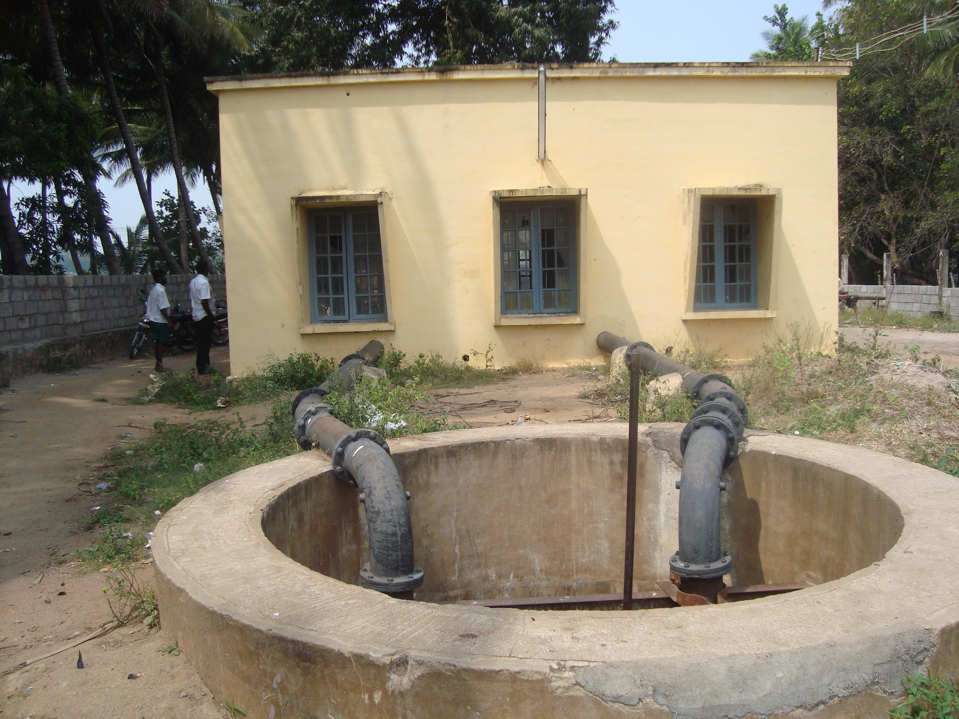 தேனி - அல்லிநகரம் நகராட்சி குடிநீரேற்று நிலையம்Unknown